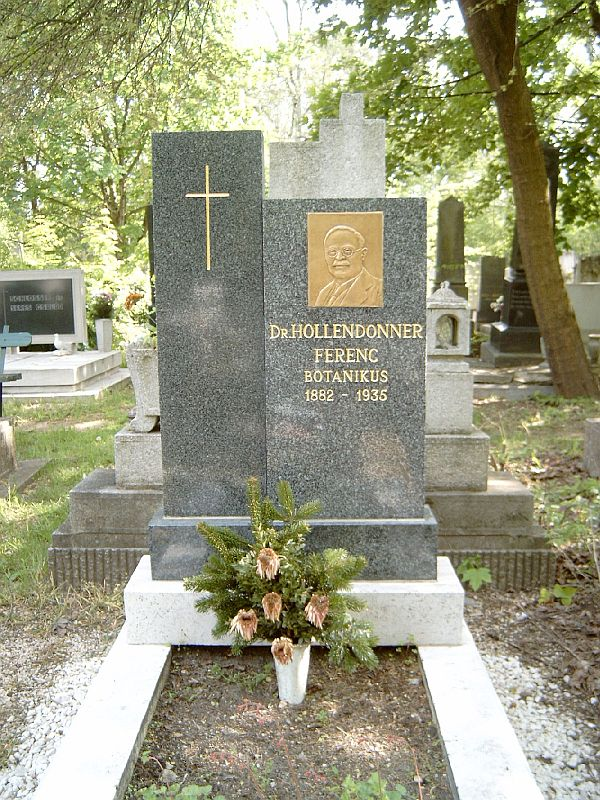 Hollendonner Ferenc (Csehi, 1882. október 10. – Budapest, 1935. április 10.) botanikus, paleontológus, tanár sírja Budapesten. Új köztemető: 33/4-1-31.